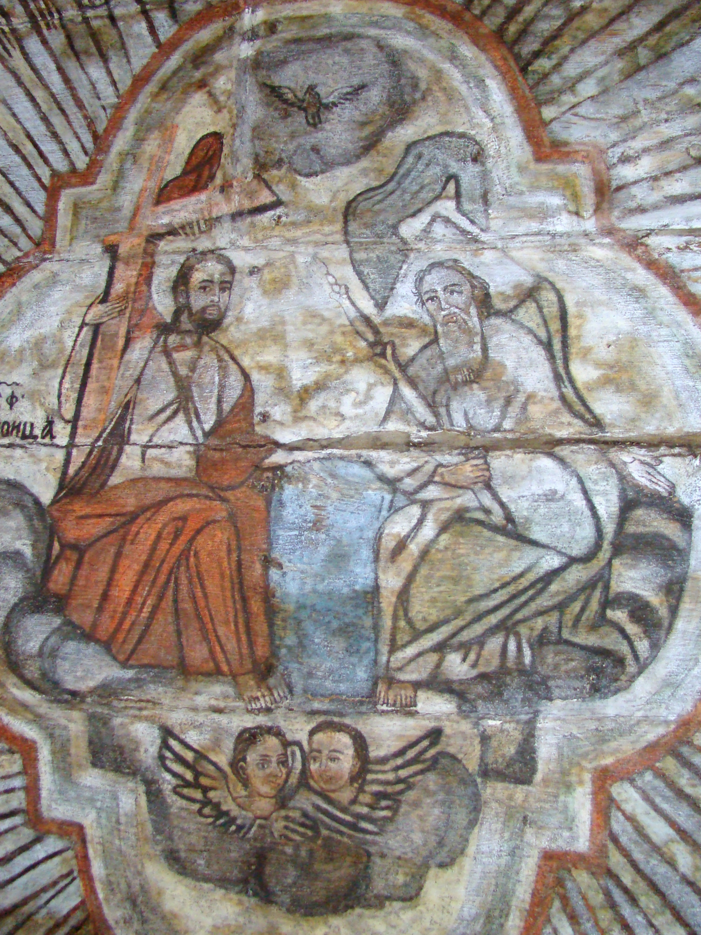 Biserica de lemn din Budești-Josani, județul Maramureș